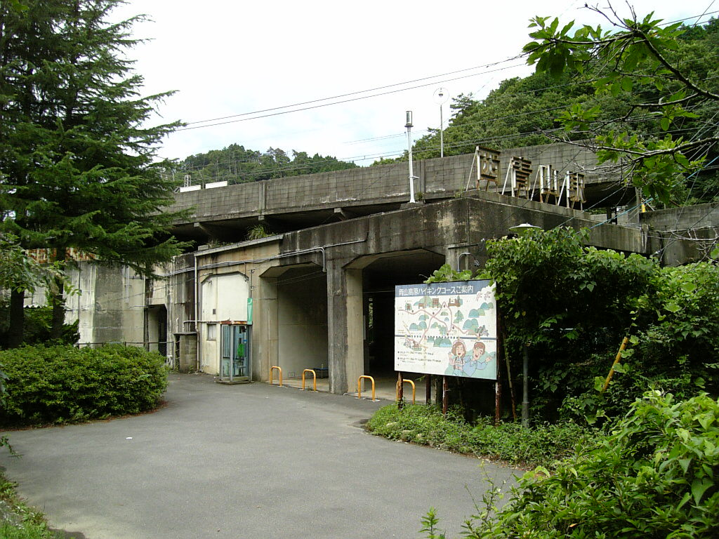 近鉄西青山駅 2007年8月撮影。 機材：V604SH 撮影者：Kansai explorer